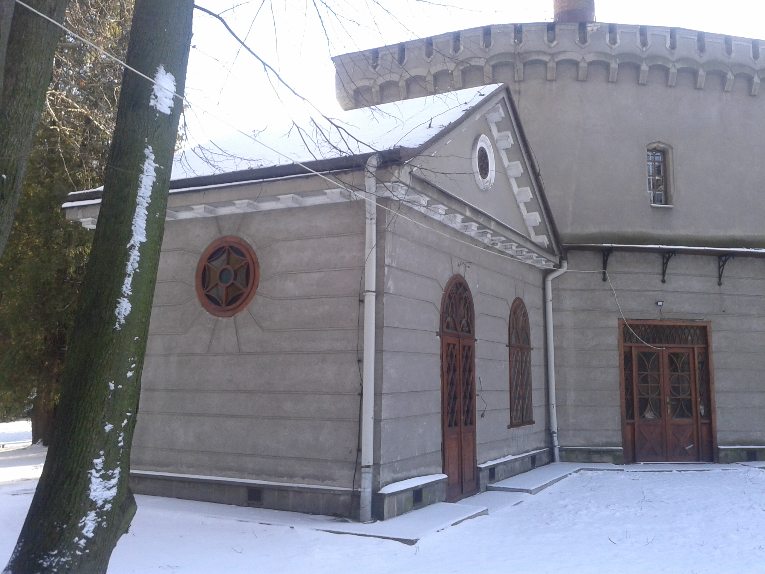 Przy Pałacu Lubomirskich w Przeworsku znajdowała się kaplica prywatna przystosowana do odprawiania Mszy Świętych. Jej budową kierował Antoni Bauman, syn Fryderyka. Wnętrze kaplicy było dekorowane stiukami i sztukateriami. Służyła ordynatowi przeworskiemu i jego rodzinie. Nie jest znane wezwanie kaplicy. Obsługiwana była przez kapłanów z parafii Ducha Świętego w Przeworsku.